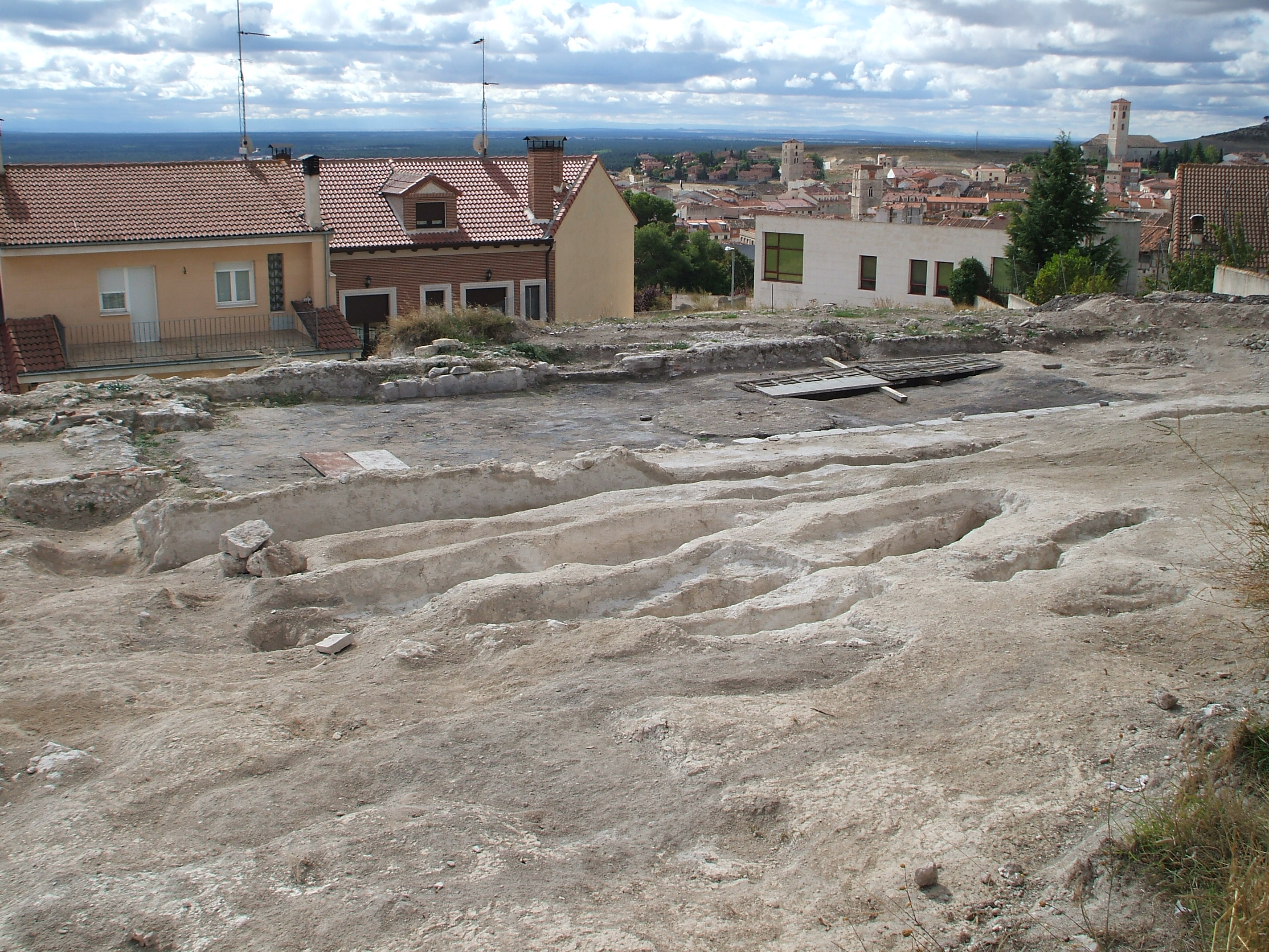 Restos de una iglesia mudéjar desconocida en Cuéllar (Segovia)